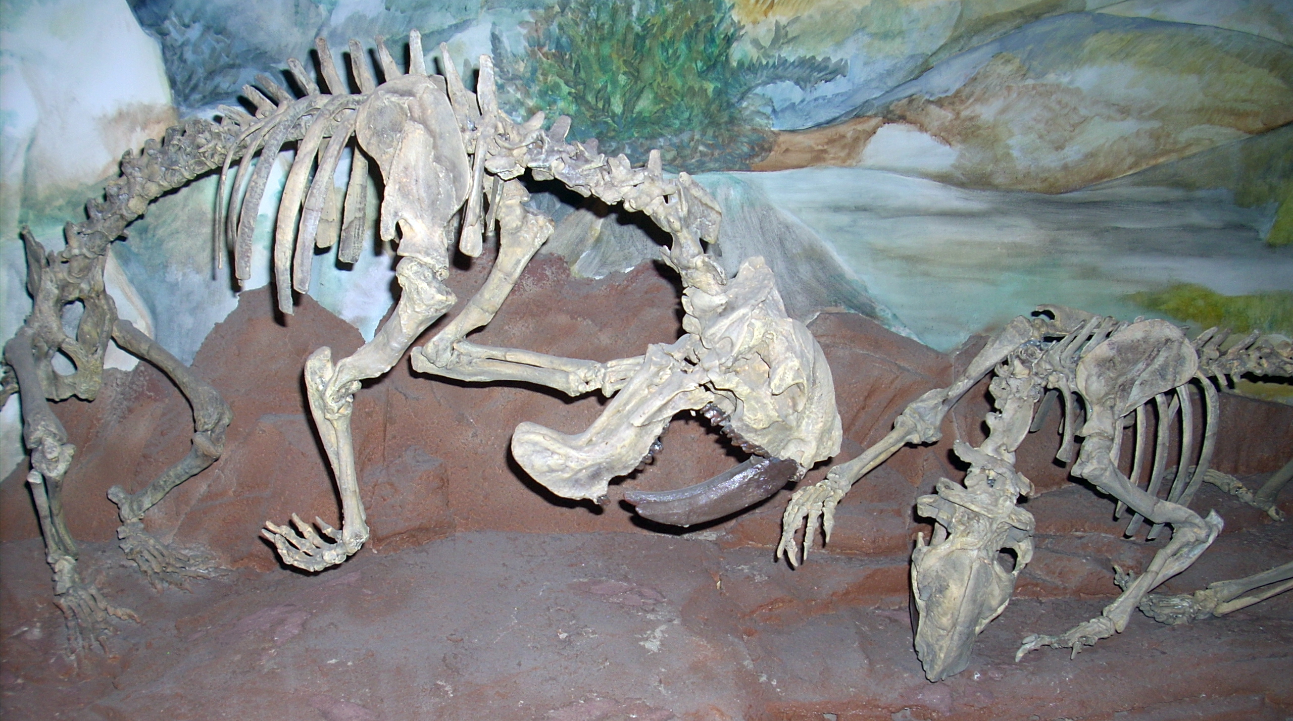 Museo Paleontológico Egidio Feruglio